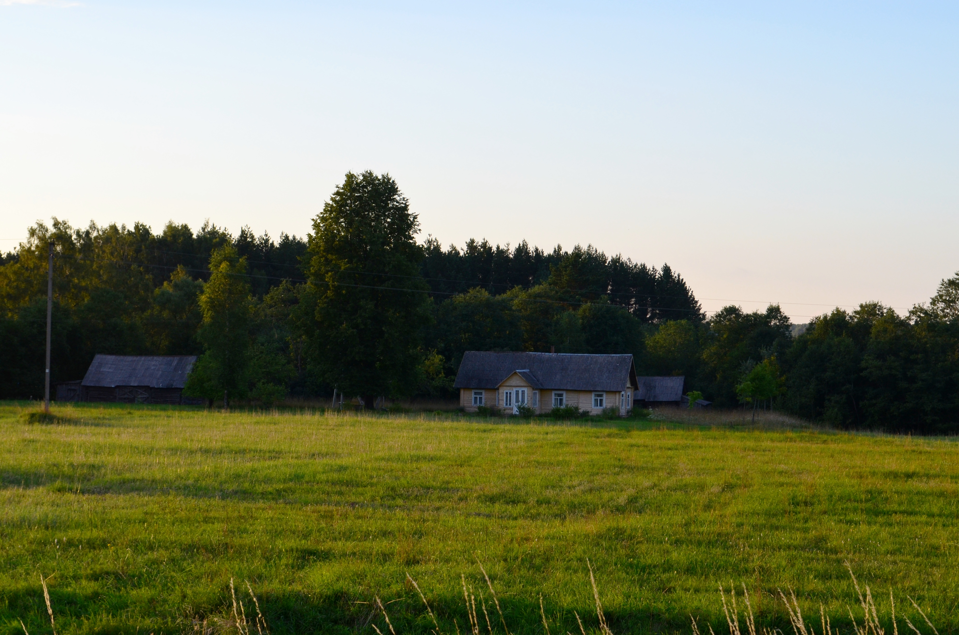 Pagrabuosčių k., Videniškių sen., Molėtų raj.